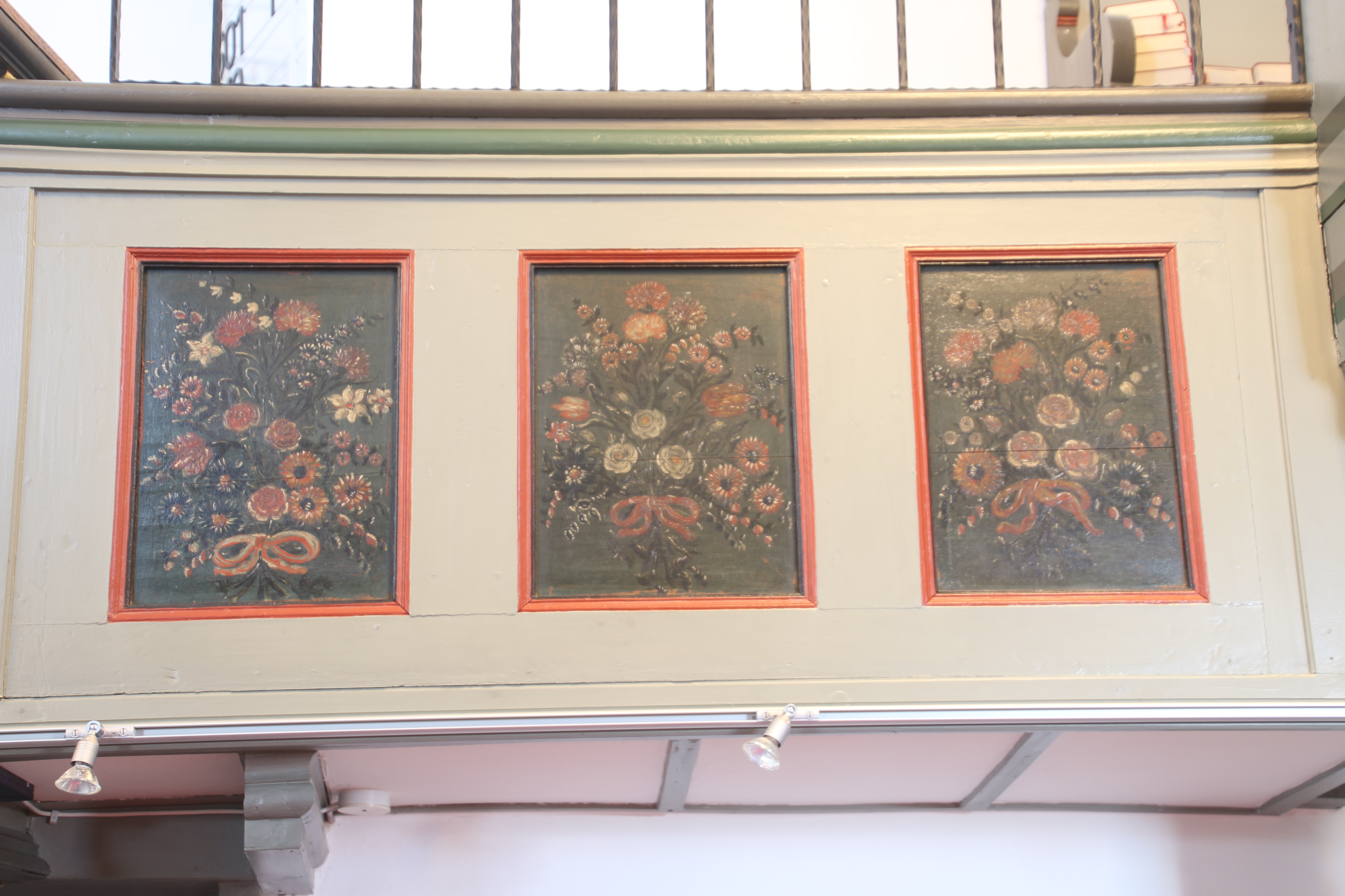 Siehe Bild und Dateiname